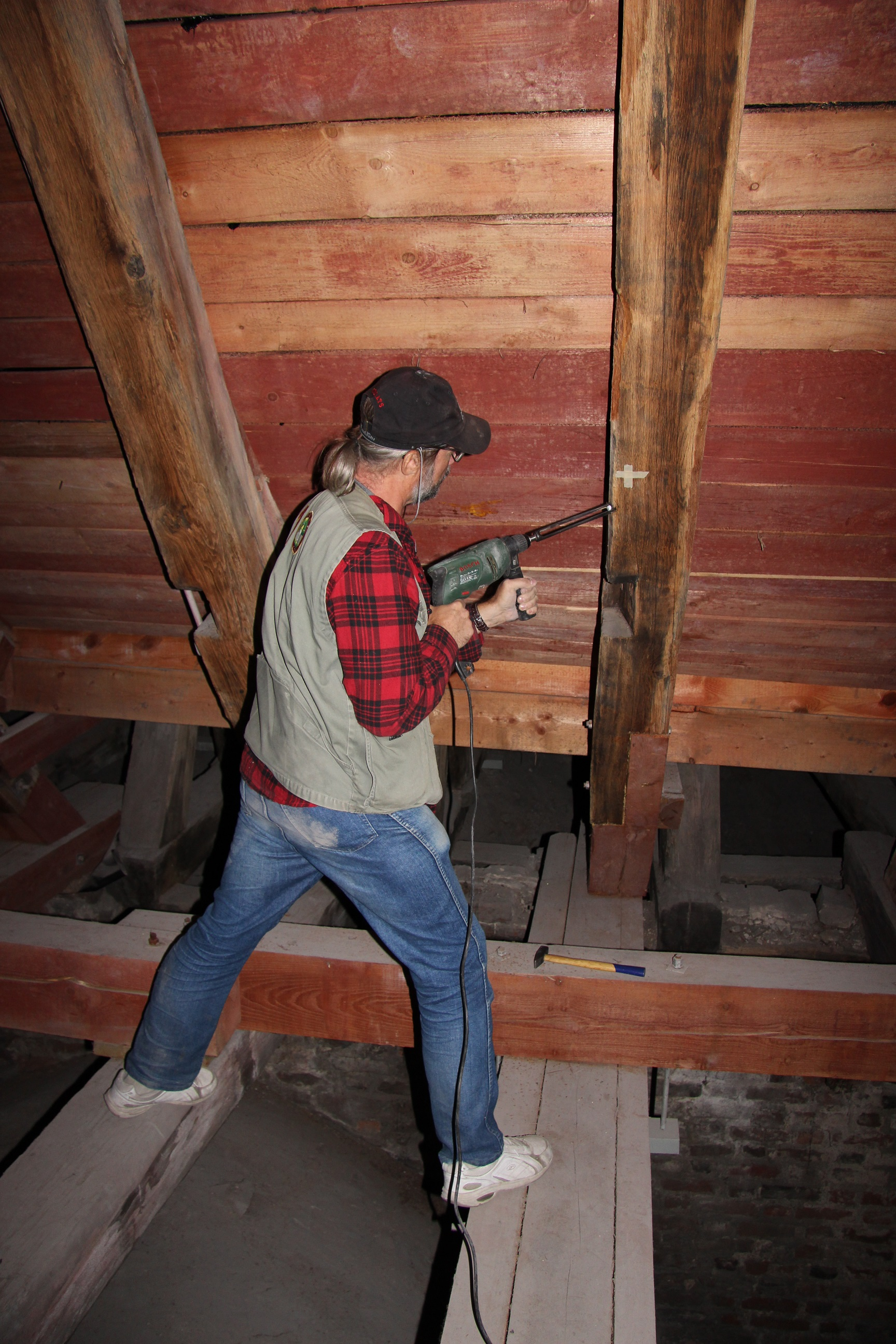 Tomasz Ważny podczas prac archeologicznych